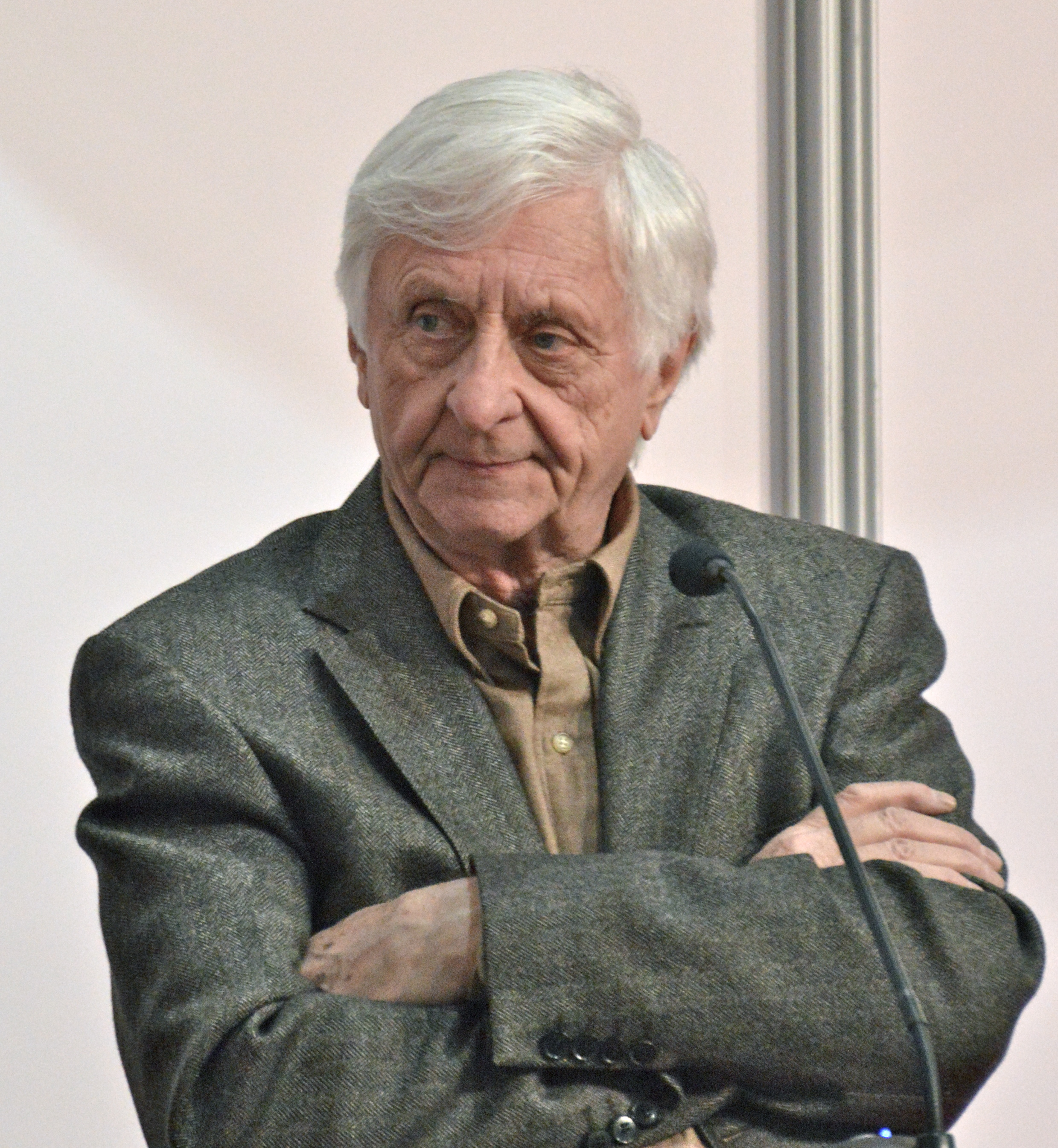 Jacques Godbout au Salon international du livre de Québec 2014